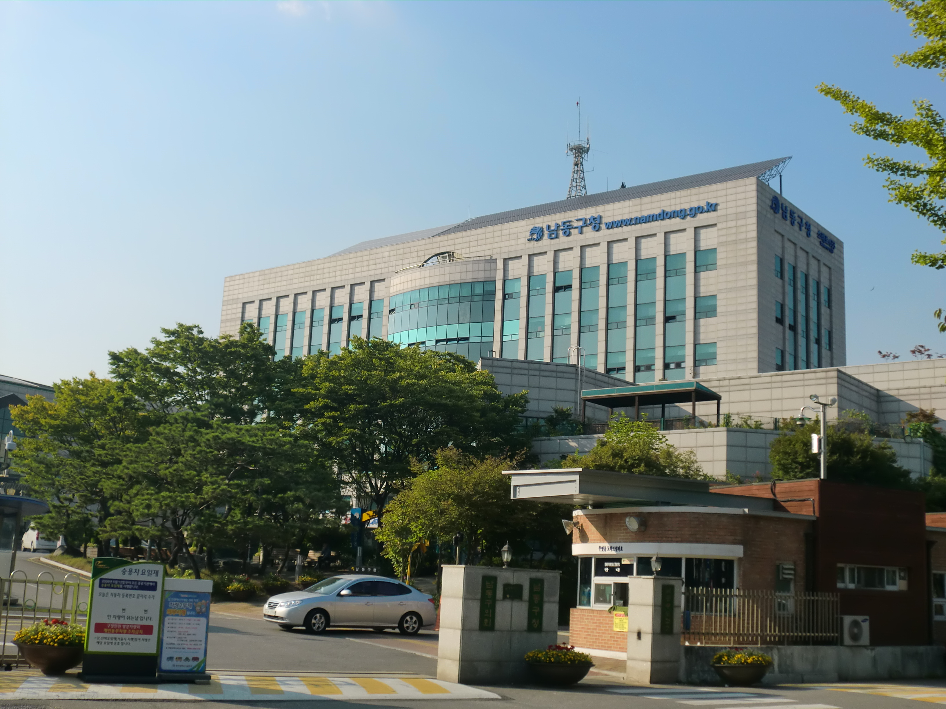 인천광역시 남동구에 있는 남동구청